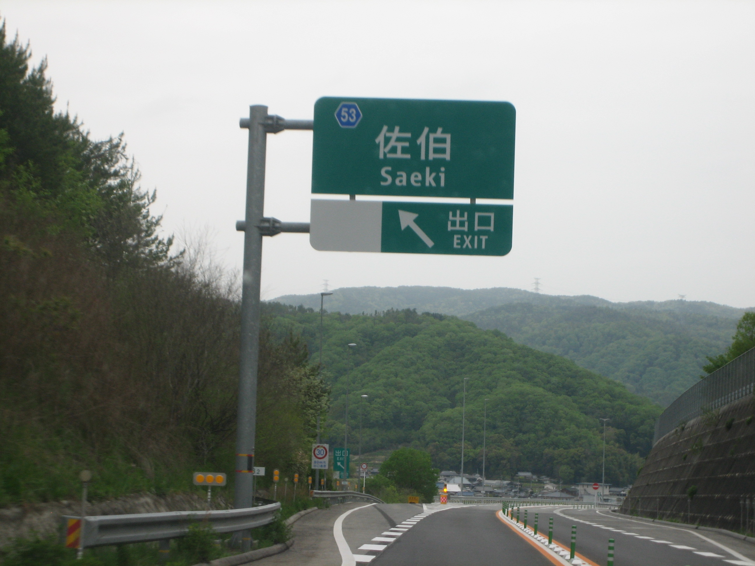 佐伯IC出口